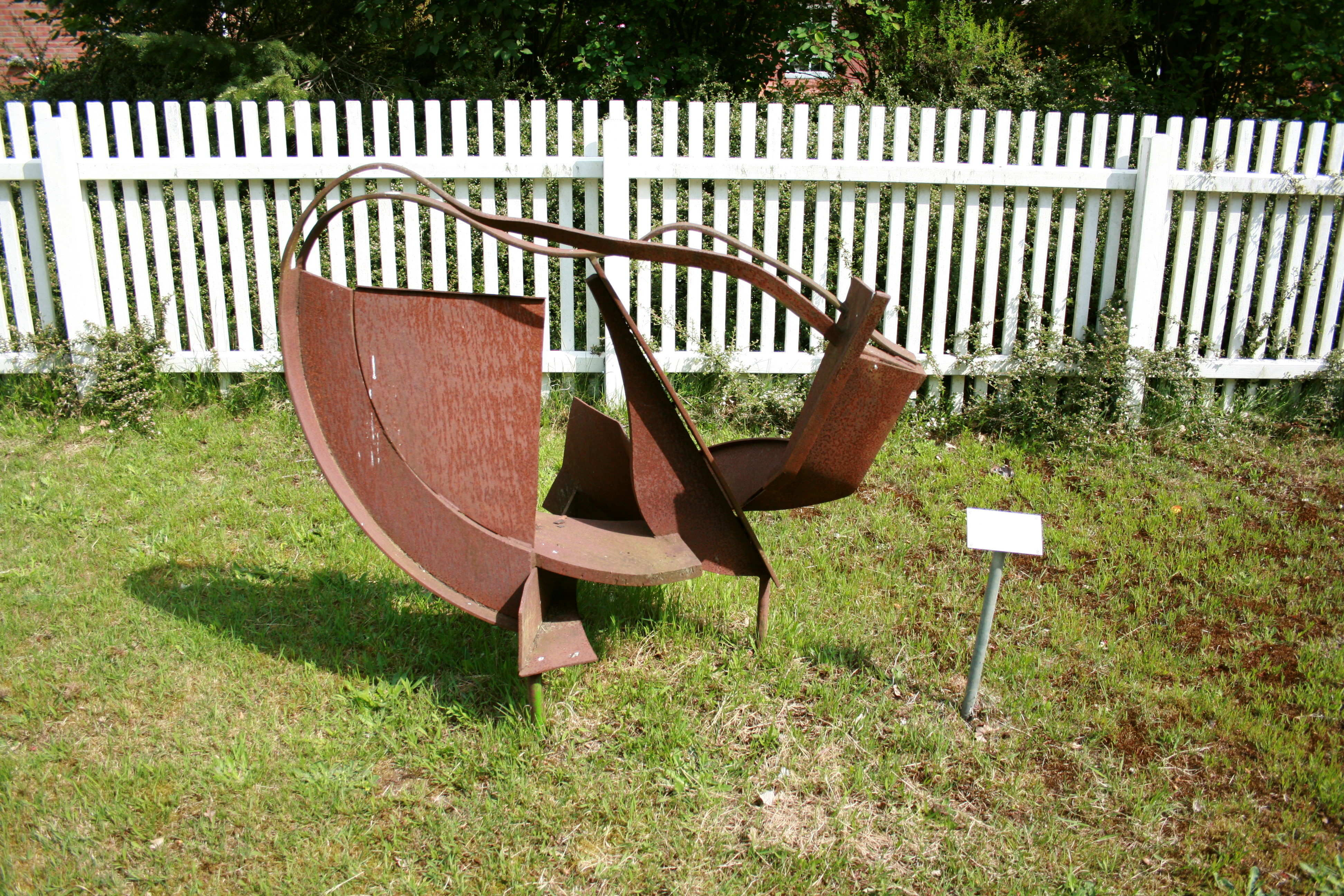 Im „Park für unerwünschte Skulpturen“: „o.T.“, Skulptur von Gustav Reinhardt im Projekt Kunst-Landschaft des Kunstvereins Springhornhof in Neuenkirchen (Lüneburger Heide)